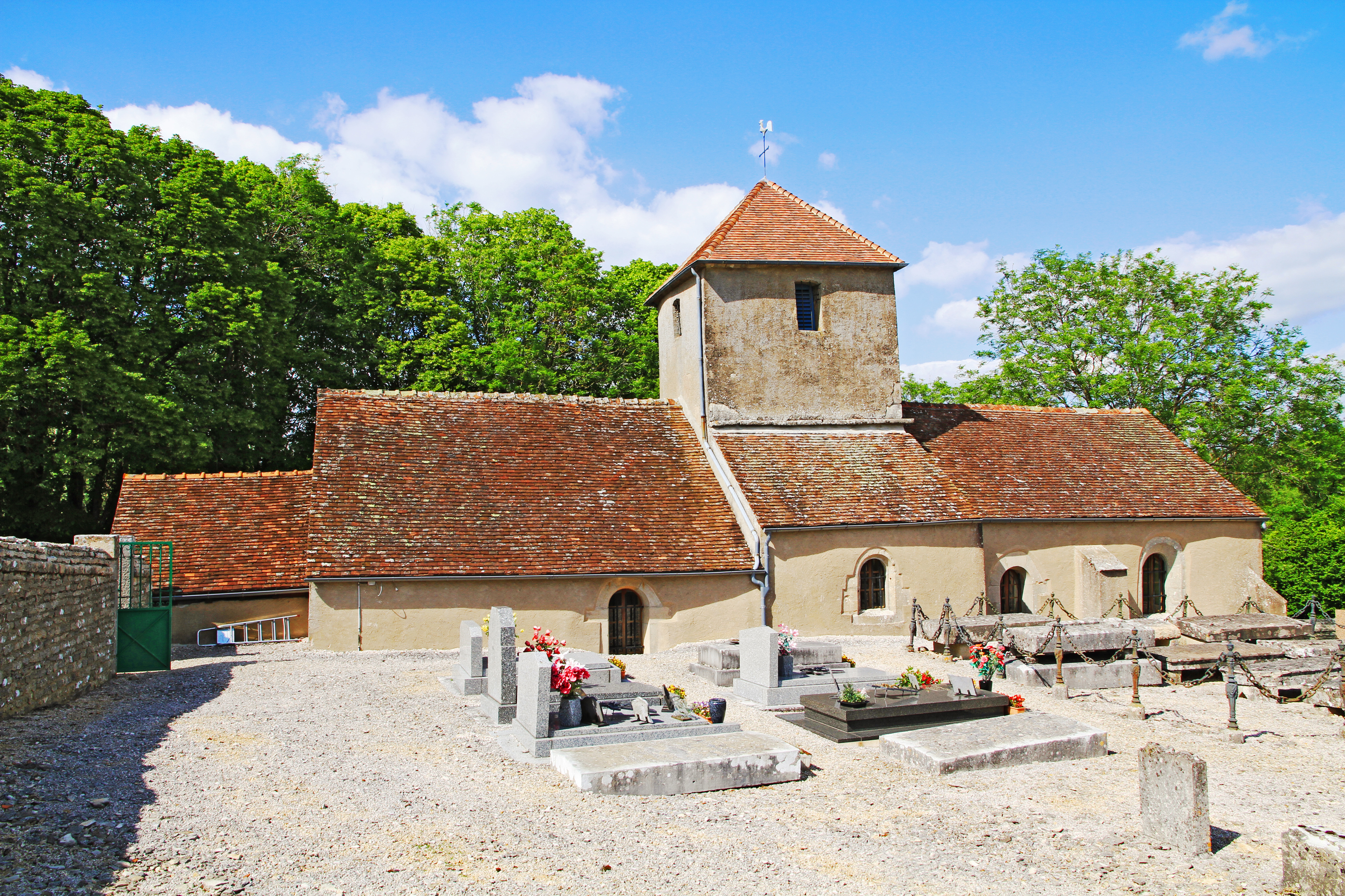 Église de la-Nativité-de la-Vierge au hameau de la Chaleur (commune de Vieilmoulin)